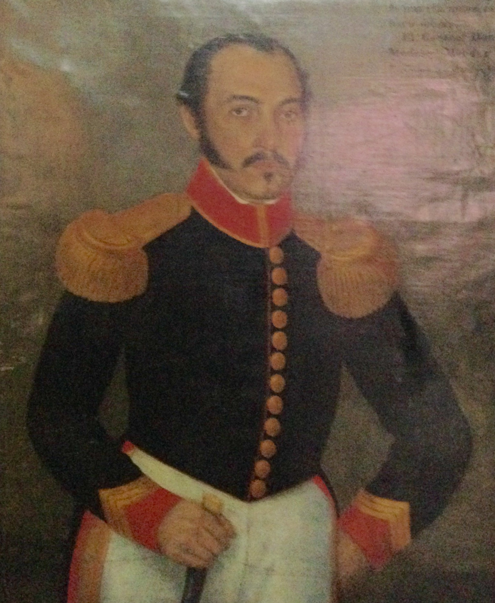 Retrato del corregidor Modesto Méndez, quien descubrió las ruinas mayas de Tikal. Colección del Museo Nacional de Historia de Guatemala.